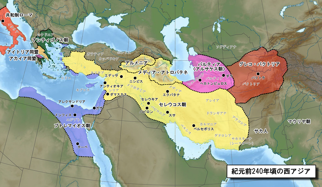 File:Relief Map of Middle East.jpgのデータを元に、ポンペイウス・トログス『地中海世界史』pp. 330-331の地図、及び、吉川弘文館『世界史年表・地図』を参考に作成した自作地図。